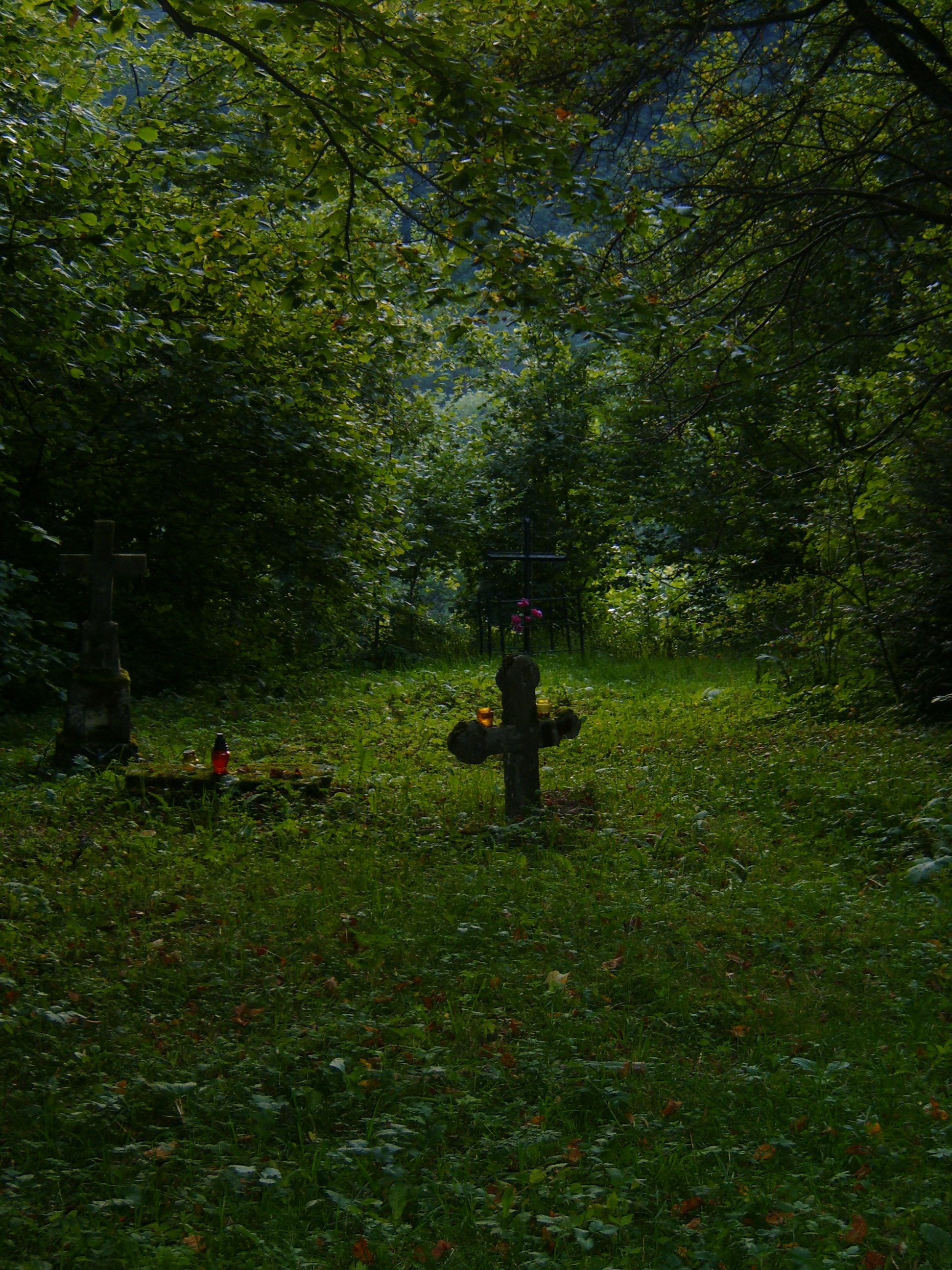 Miejsce po cerkwi i stary cmentarz, okolice miejscowości Bystre